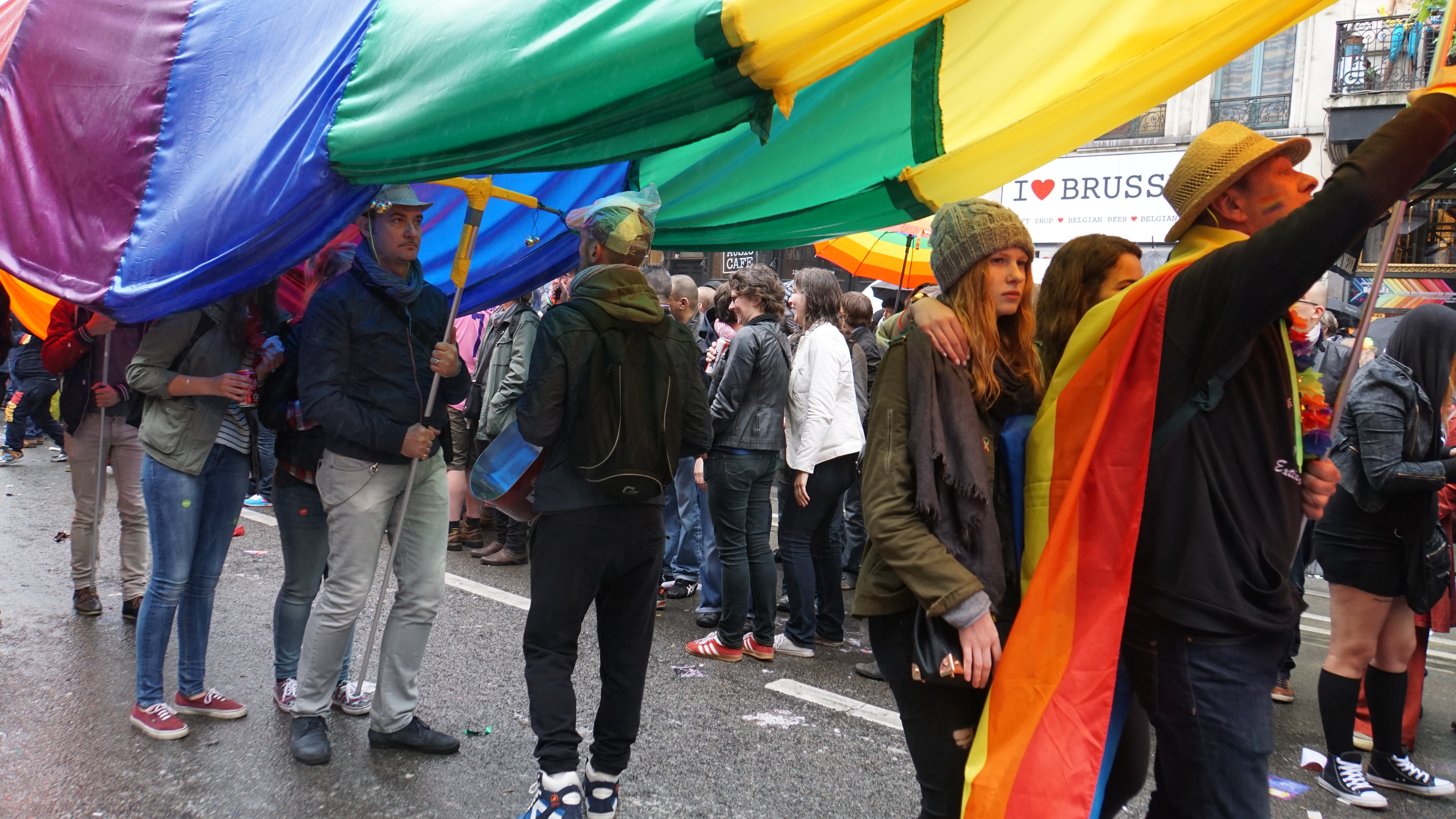 2015-05-16_15-47-04_ILCE-6000_DSC05097 Brussels Pride 2015